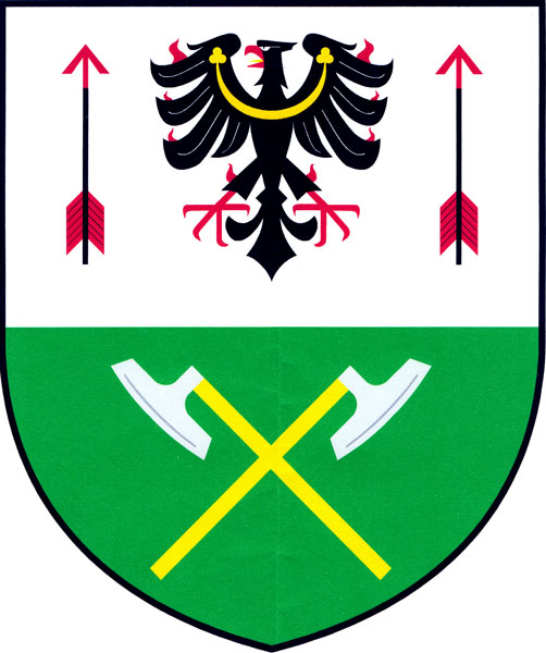 Znak obce Mrsklesy